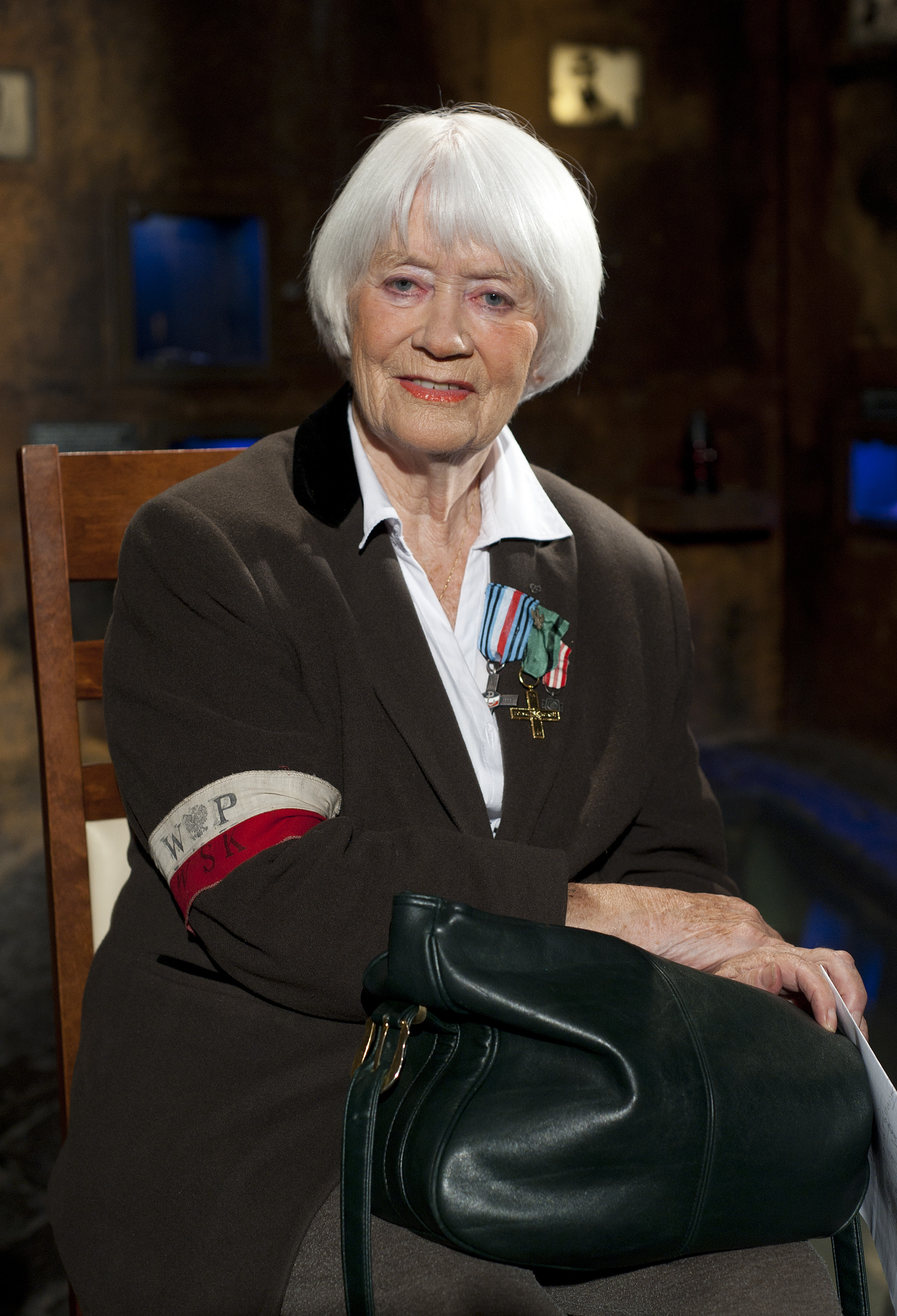 Alina Janowska podczas obchodów 66 rocznicy wybuchu Powstania Warszawskiego w Muzeum Powstania Warszawskiego w Warszawie